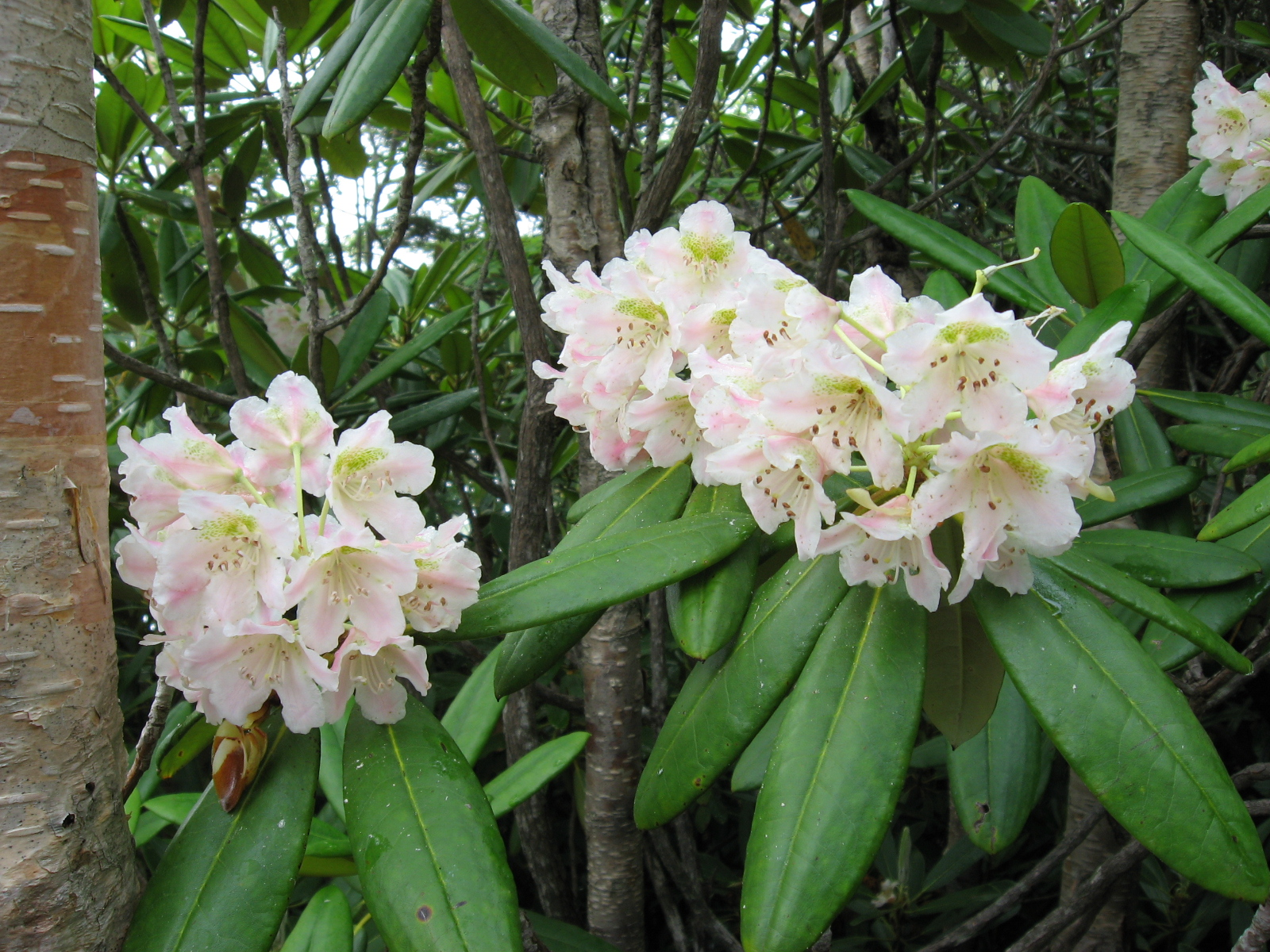 ハクサンシャクナゲ (学名:Rhododendron brachycarpum)